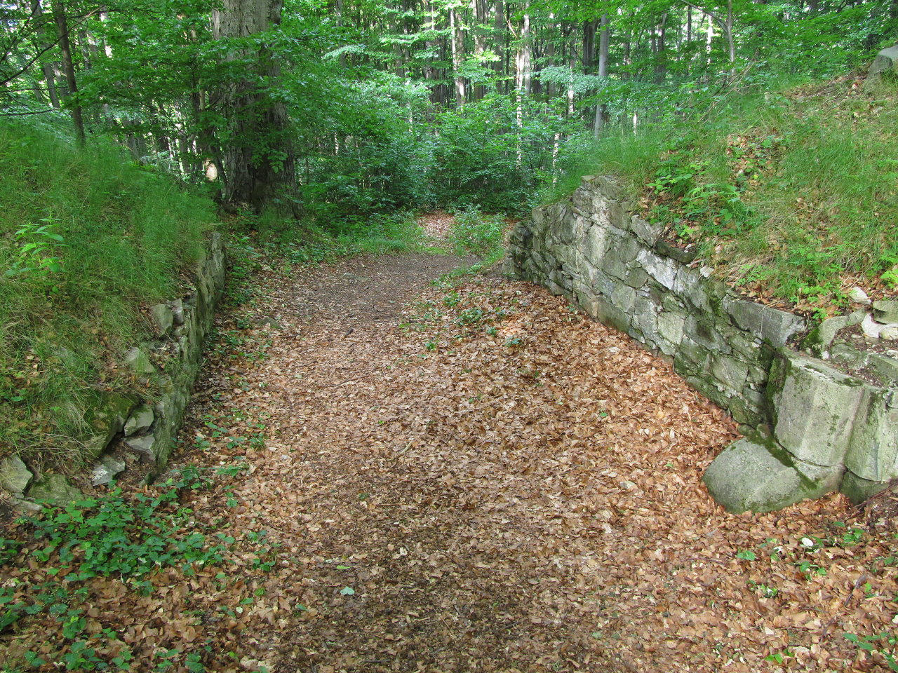 Zbytky zdiva hradu Křídlo.